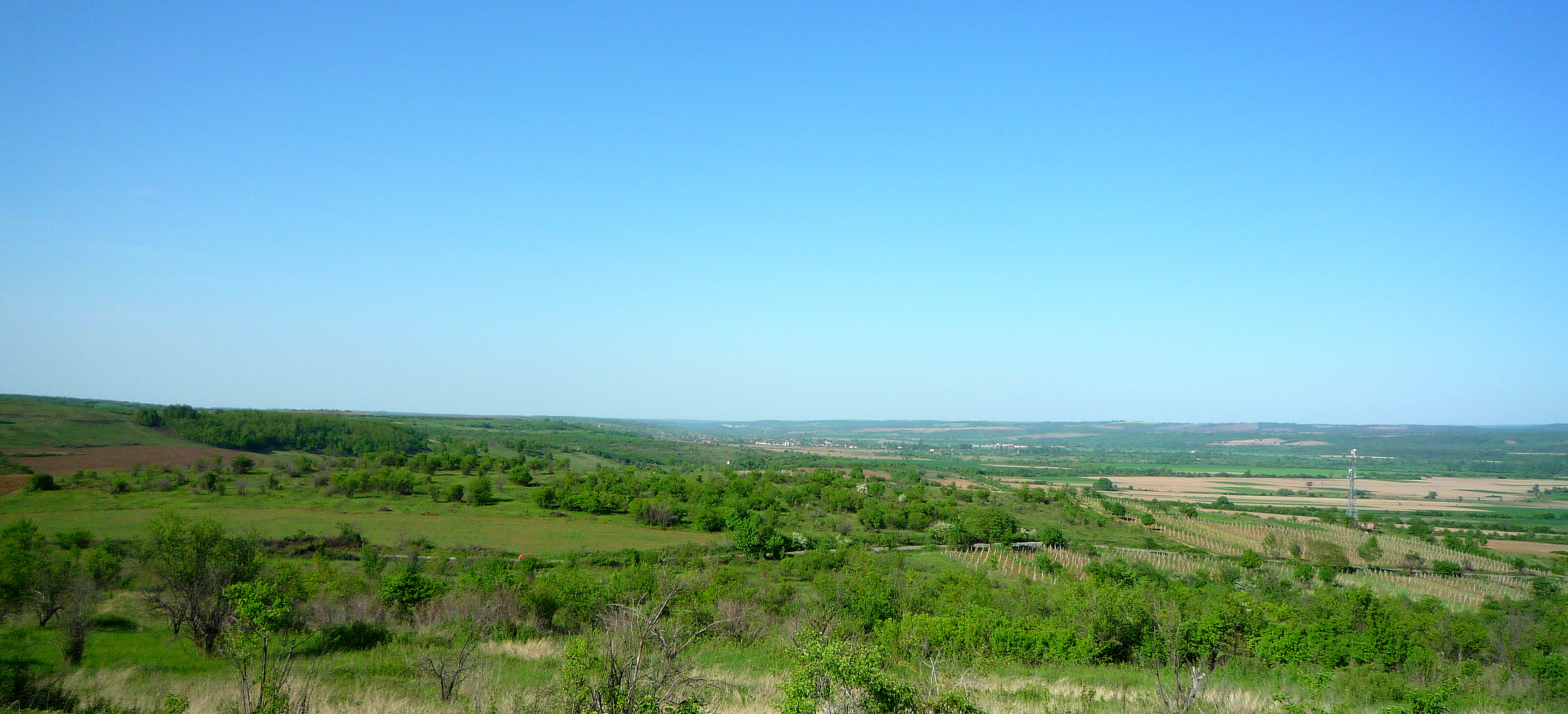 Панорама на север-Дунавска равнина